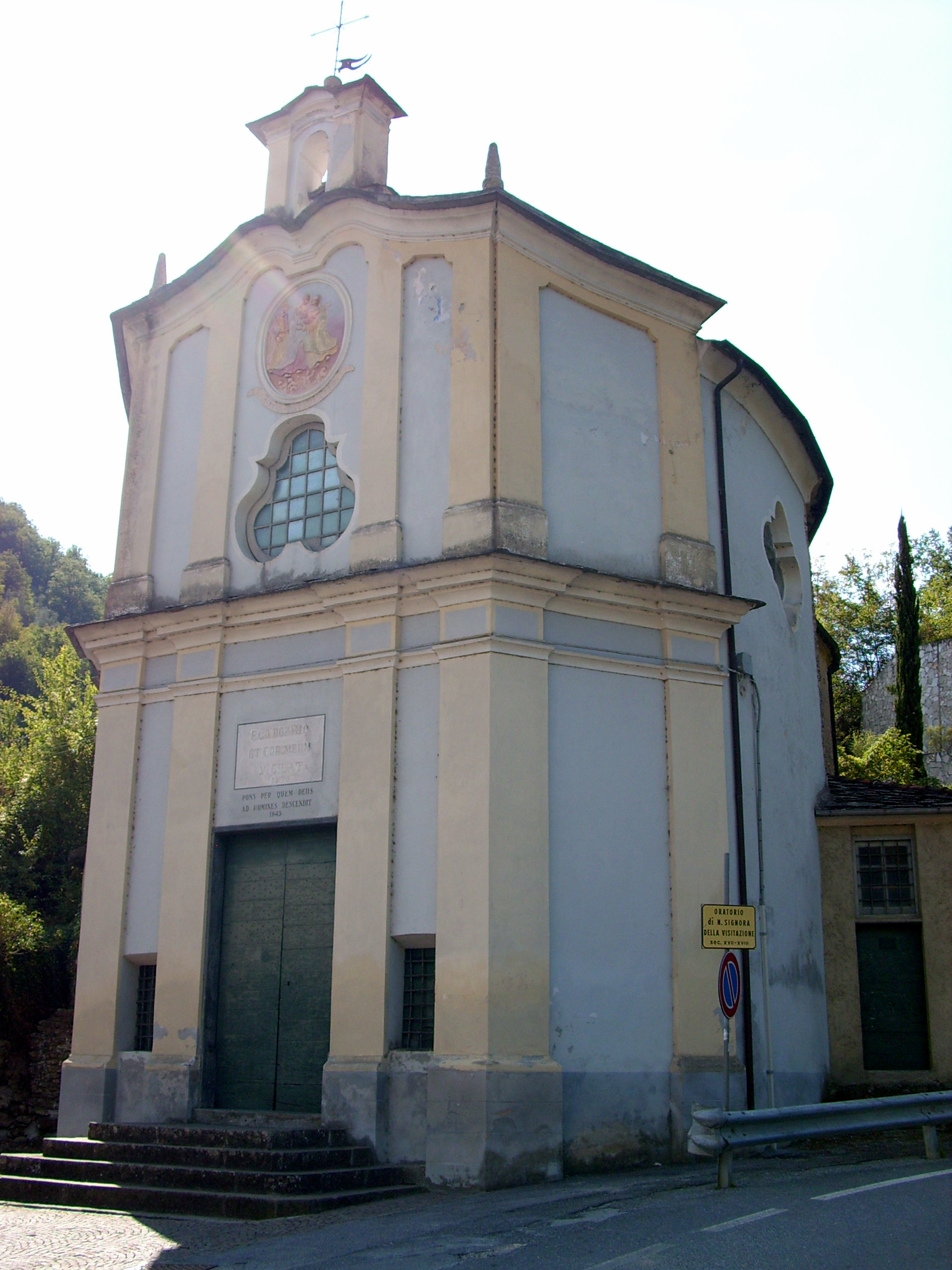 Oratorio della Visitazione di Vessalico, Liguria,Italia